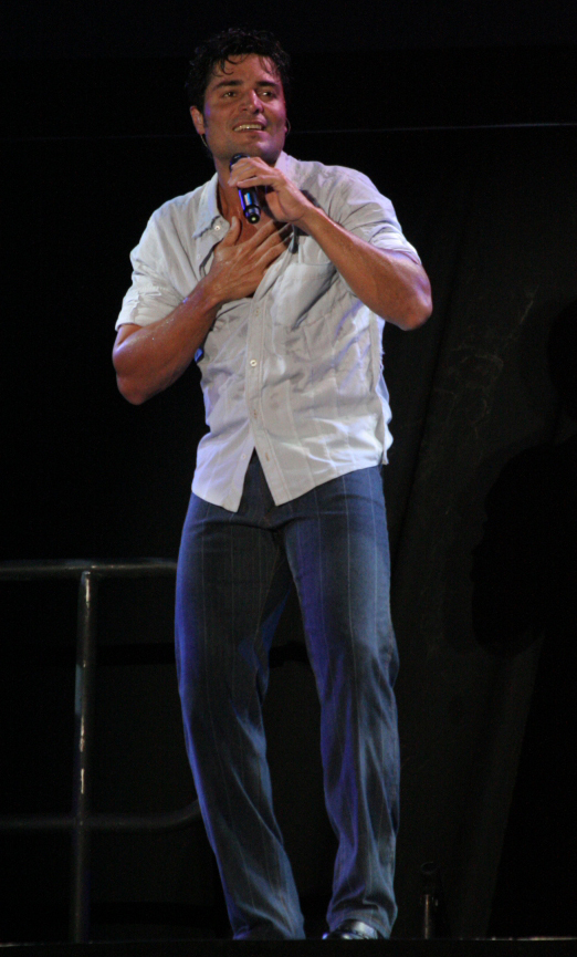 Chayanne in a concert in Managua, Nicaragua.